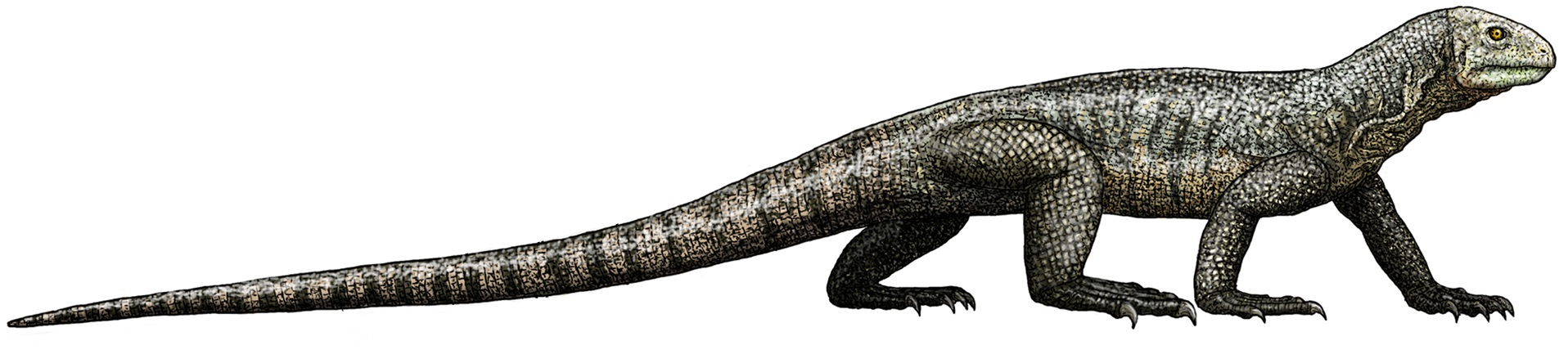 Credit Dr. Jeff Martz/NPS